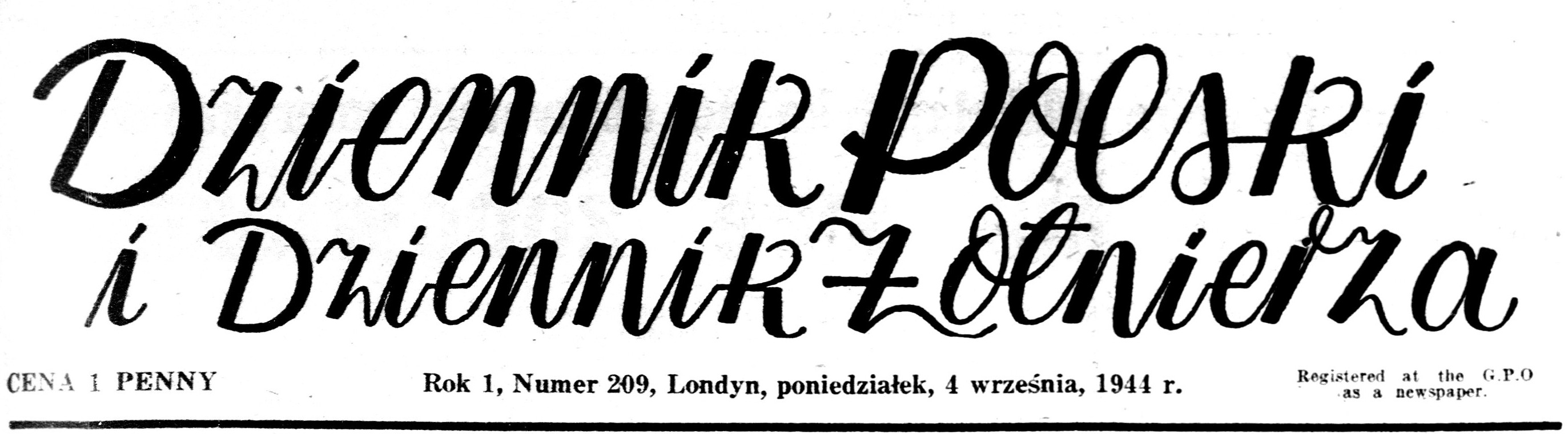 winieta polskiej gazety wydawanej w Londynie